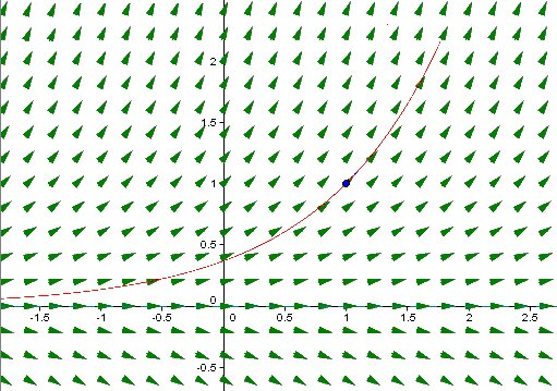 Image réalisée à partir d'une copie d'écran du logiciel libre GeoGebra